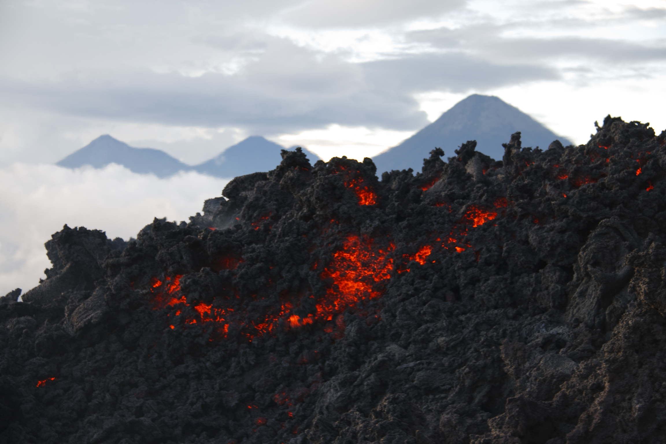 Flujo de lava del Volcán Pacaya, Guatemala.